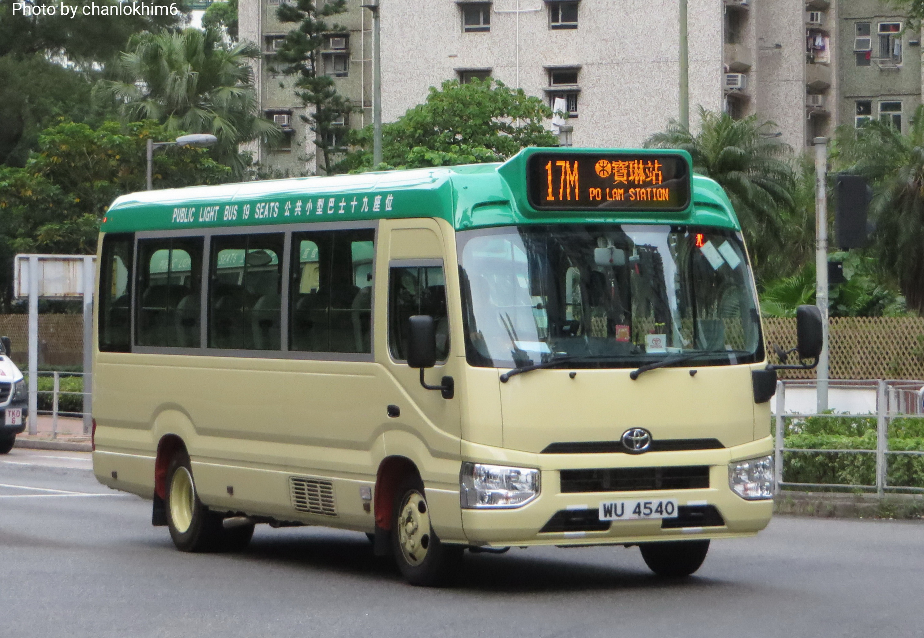 中文（中国大陆）: 小巴WU4540的照片